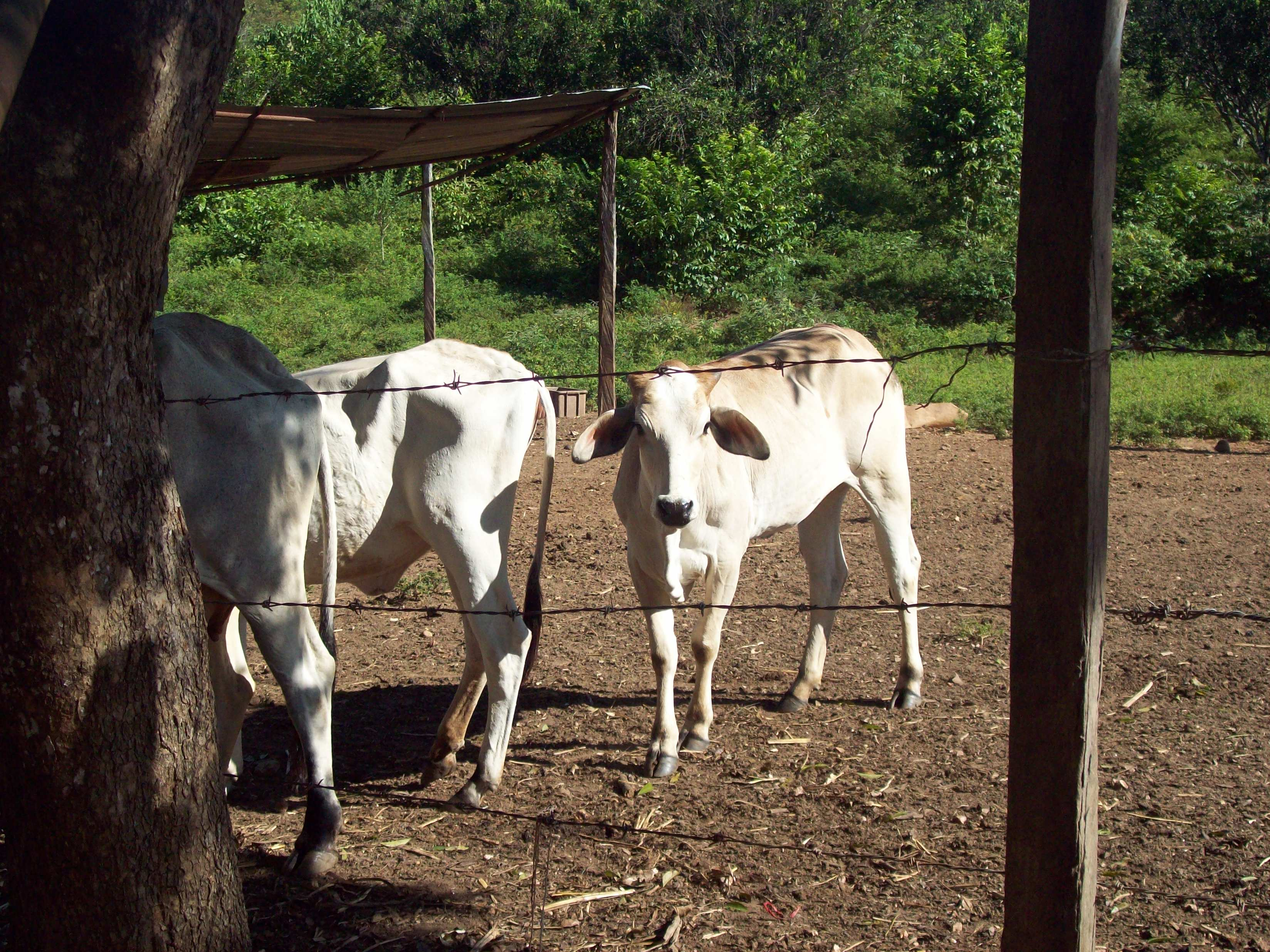 Ganado en Bejuma, Estado Carabobo, Venezuela